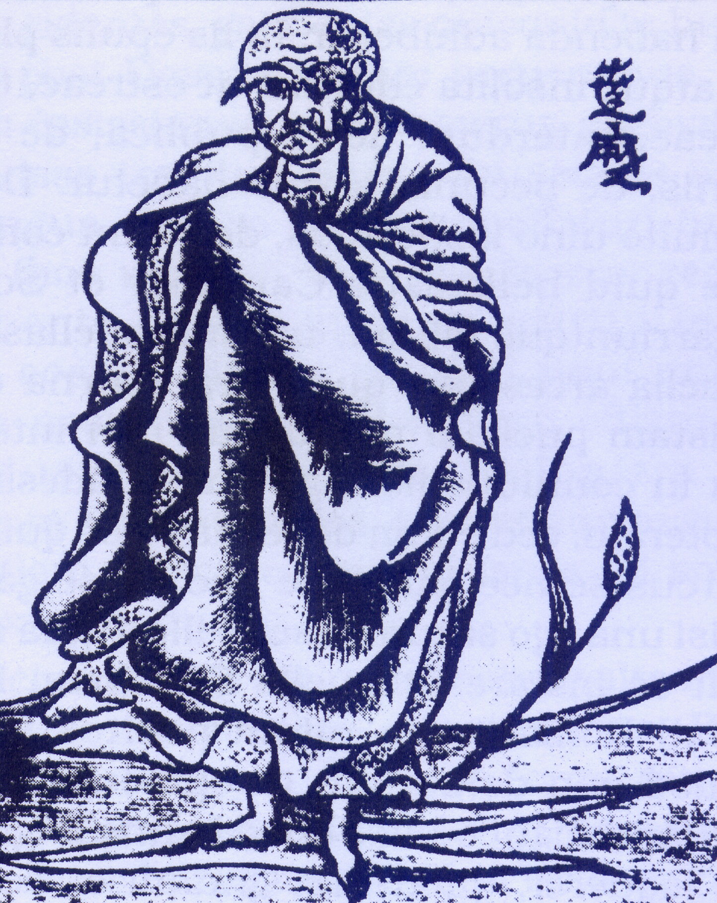 Un missionnaire bouddhiste revêtu du pallium hellénique, venant d'Inde et traversant le Fleuve Bleu sur un roseau pour aller convertir les Chinois.